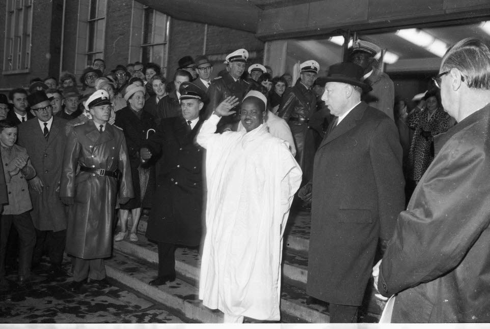 Ministerpräsident Helmut Lemke (2.v.l.) empfängt Präsident Ahmadou Ahidjo (3.v.l.) und seine Gattin am Hauptbahnhof.